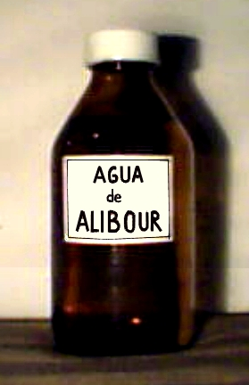 Agua de alibour - solución en frasco